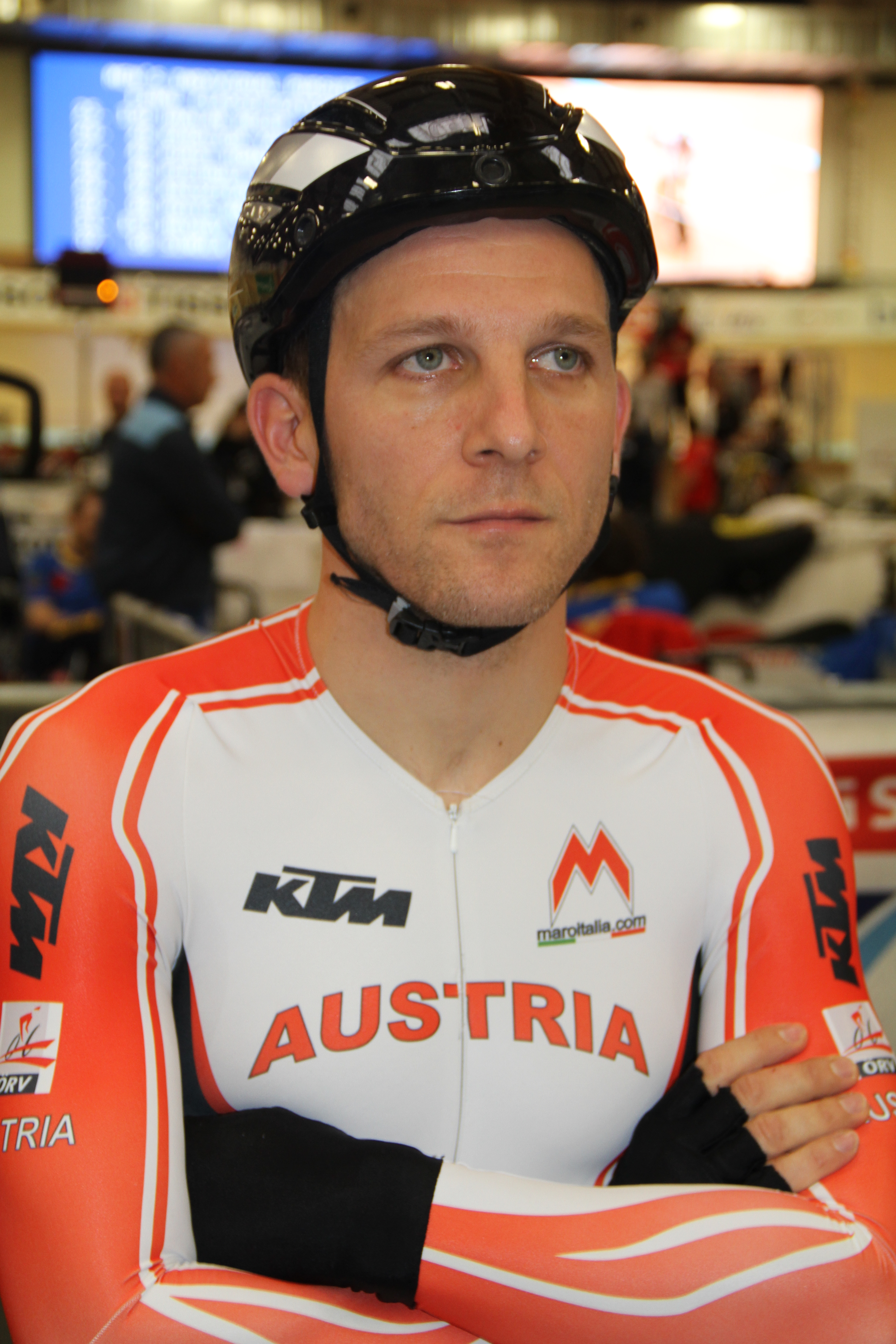 Andreas Müller, österreichischer Radsportler The making of this document was supported by the Community-Budget of Wikimedia Germany.